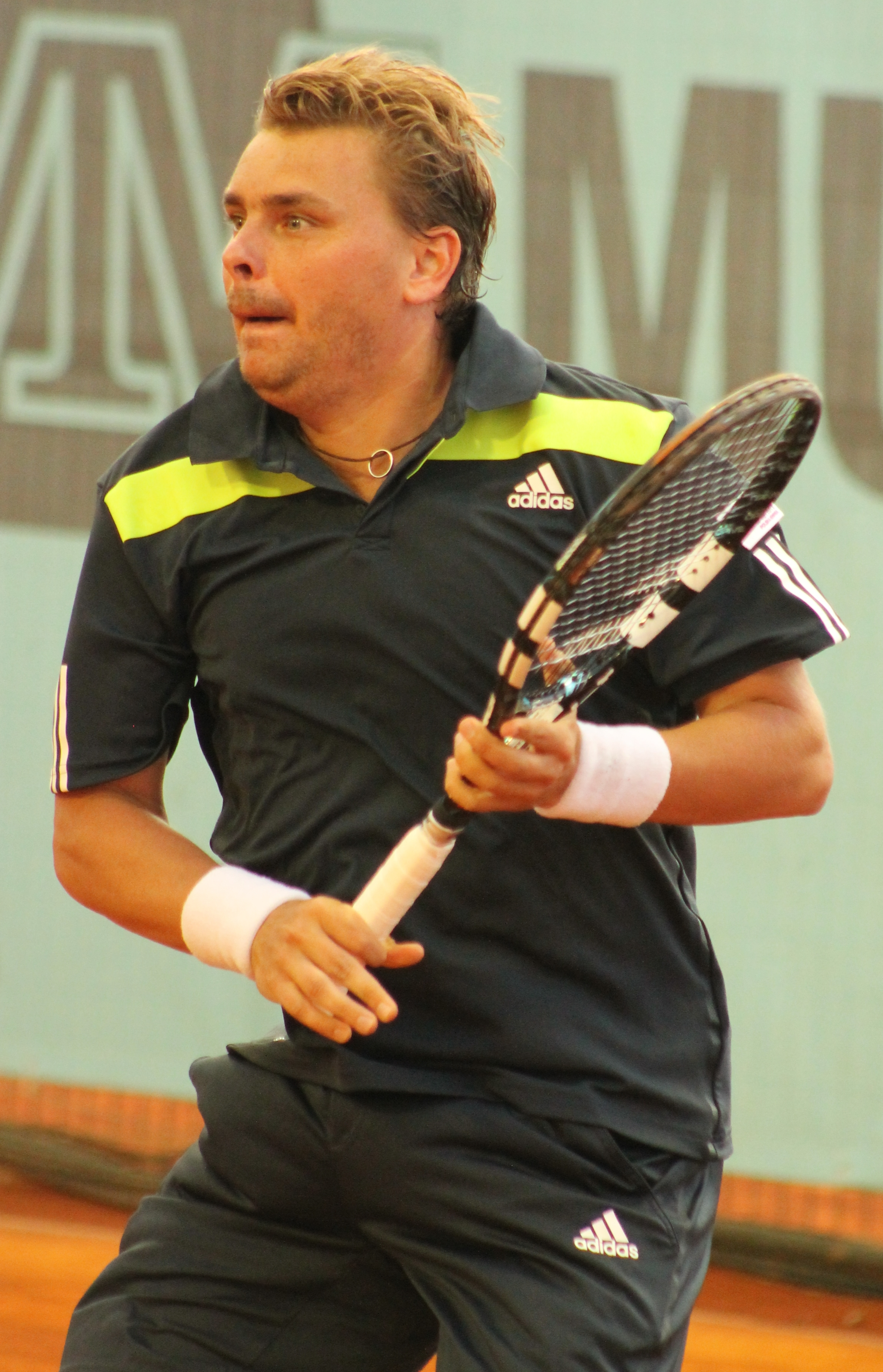 Matkowski MA14 (17)